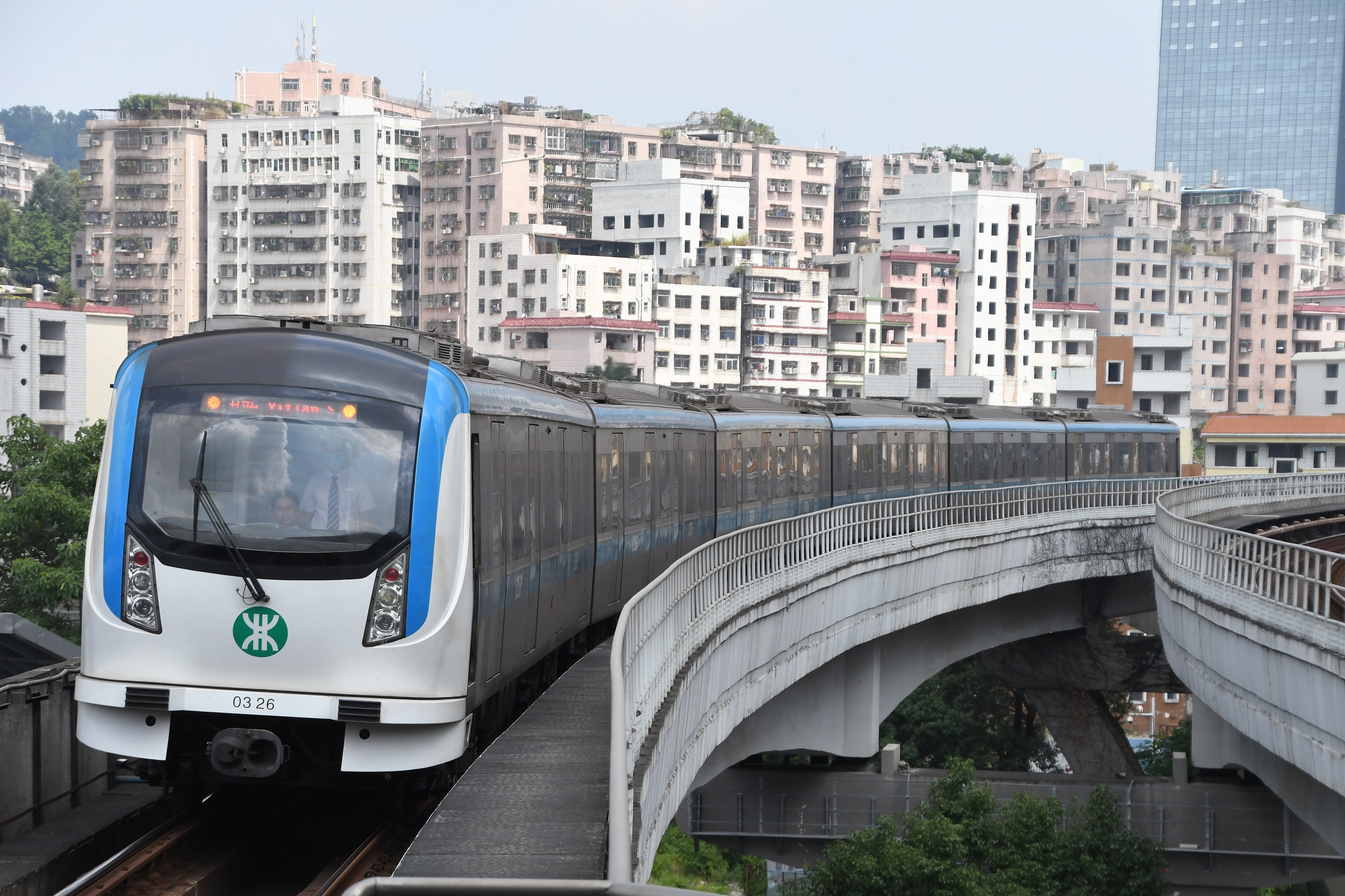 深圳地下鉄3号線 布吉駅撮影